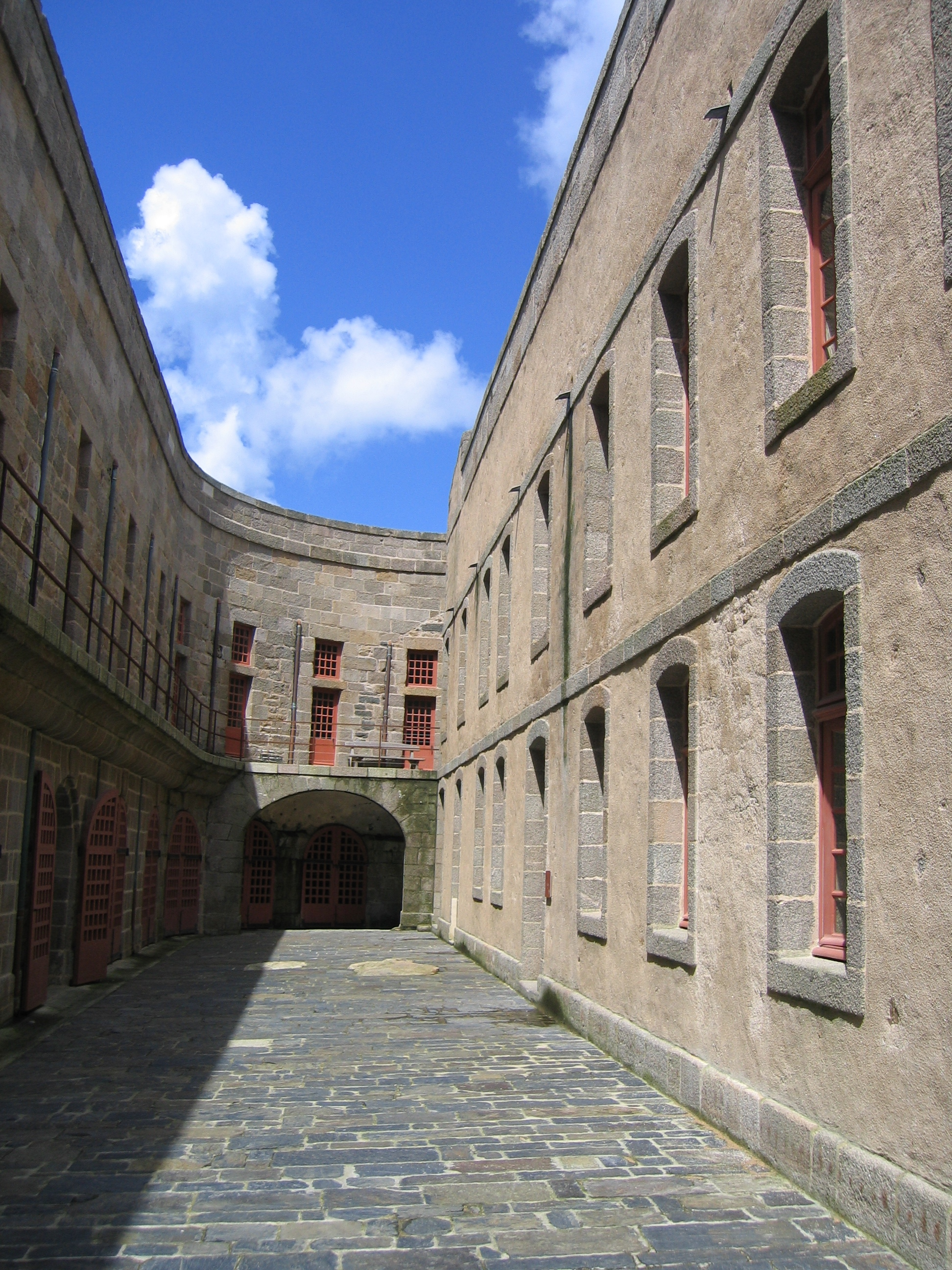 La cour du chateau